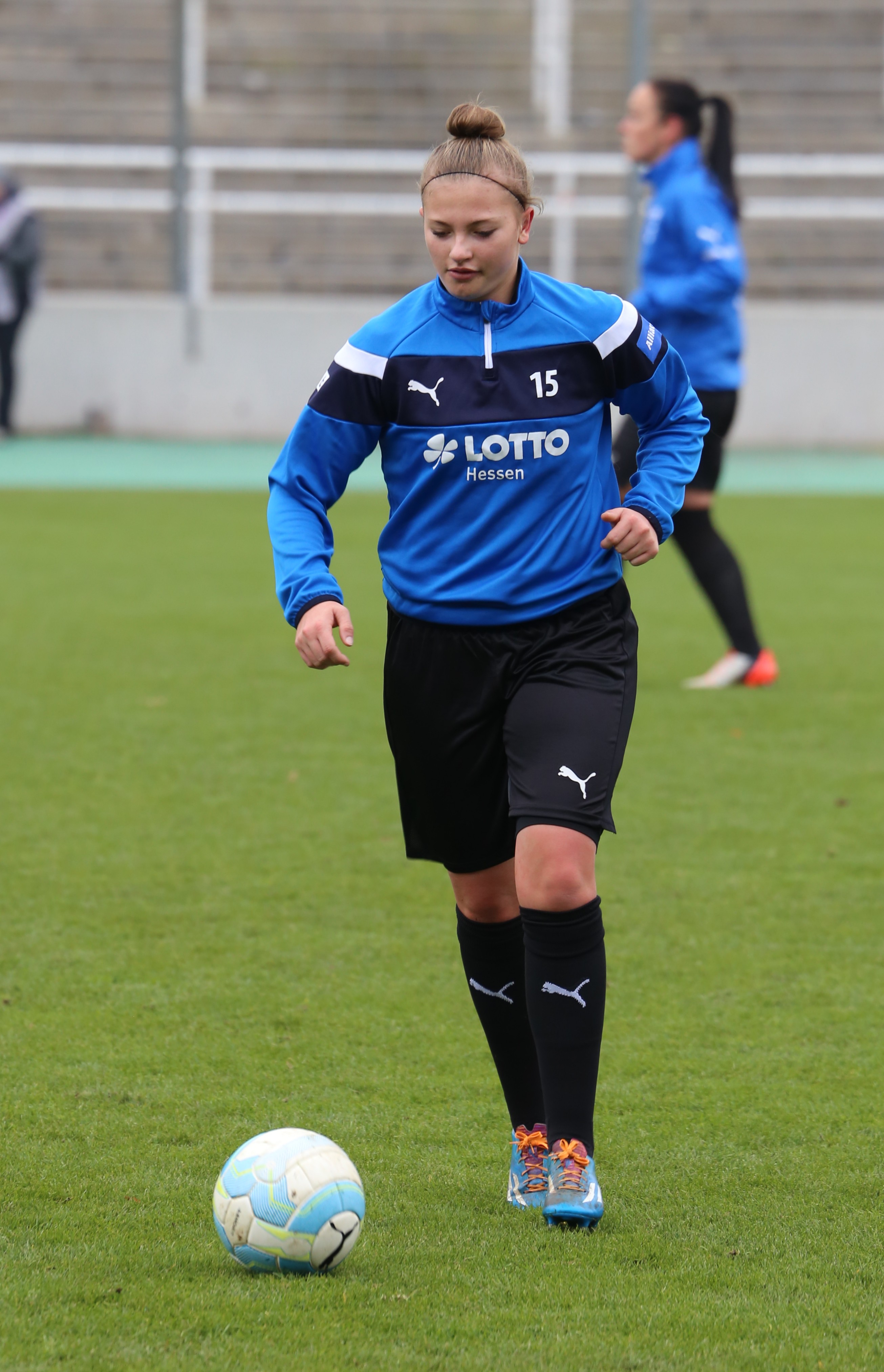 Julia Matuschewski (1. FFC Frankfurt) beim Aufwärmen vor dem Frauen-Bundesliga-Spiel FC Bayern München gegen 1. FFC Frankfurt am 13. November 2016 im Stadion an der Grünwalder Straße, München (Ergebnis war 1:0).